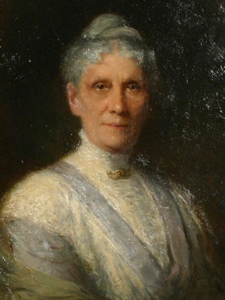 detail